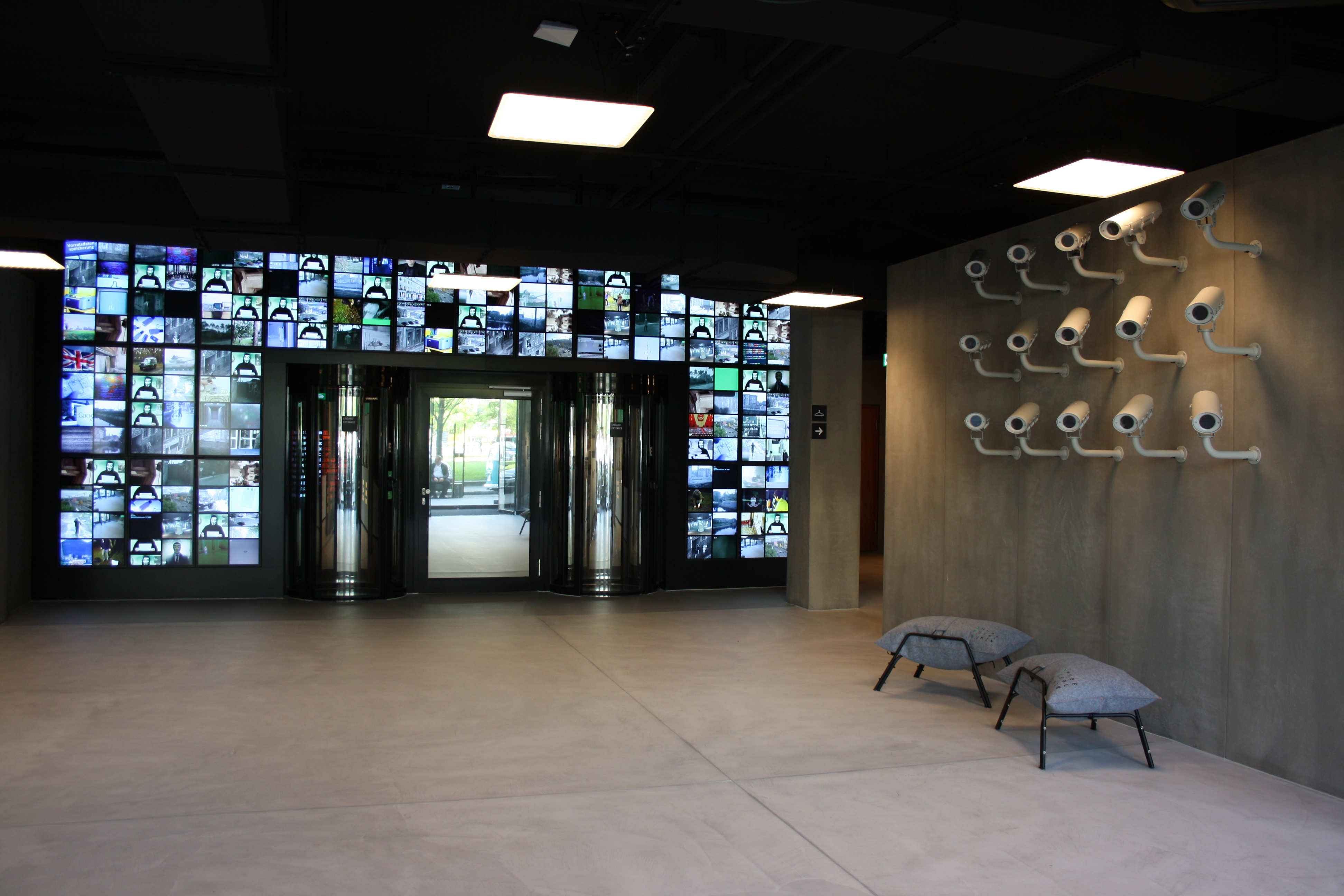 Spywatch im Eingangsbereich des Spy Museum